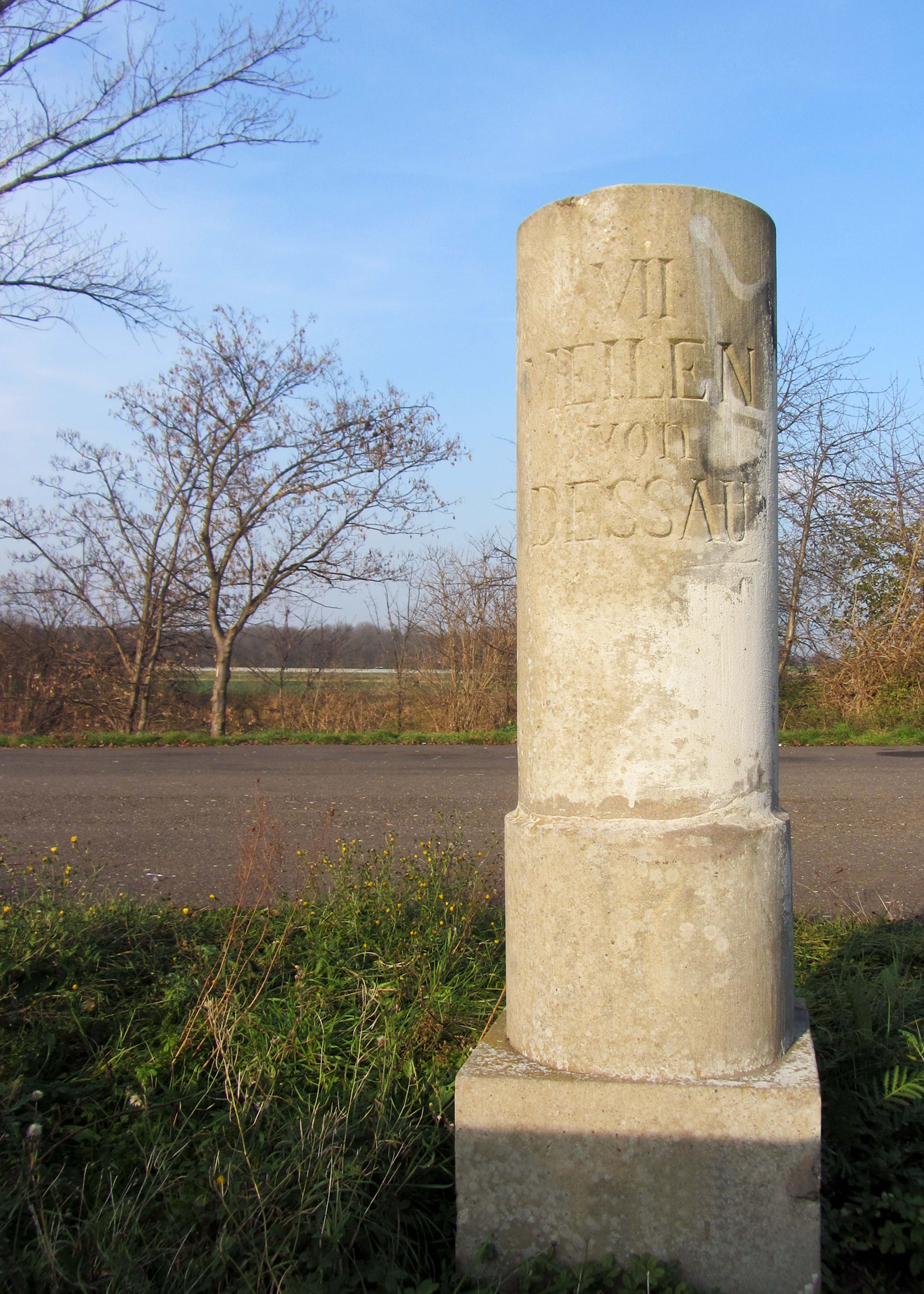 Anhaltischer Rundsockelstein an der K 1374 zwischen Ilberstedt und Güsten in Güsten Text: VII MEILEN von DESSAU